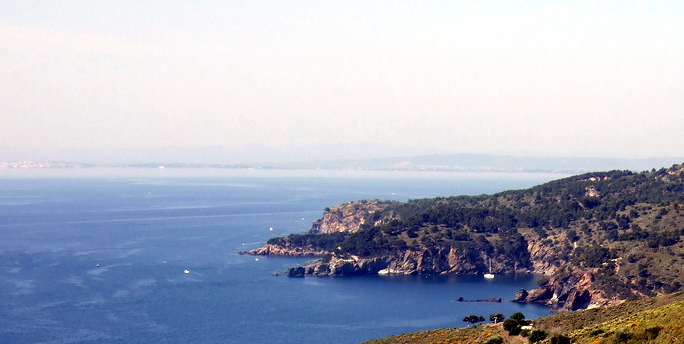 Punta Falconera (Roses, Alt Empordà).